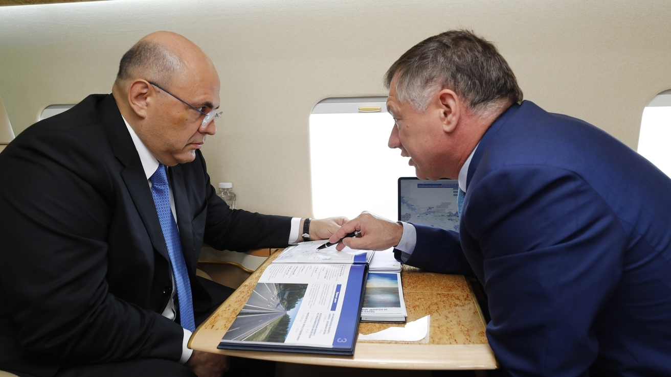 Михаил Мишустин и Марат Хуснуллин во время осмотра из вертолёта строящейся транспортной развязки федеральной трассы М-7 «Волга»